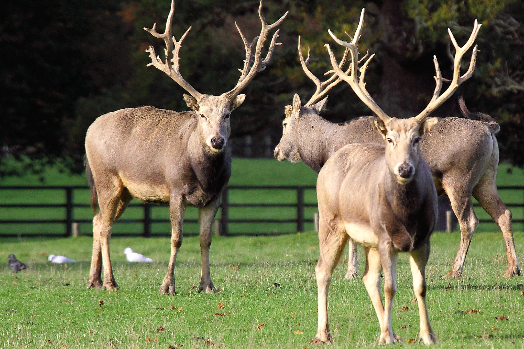 Pere David Deer - Woburn Deer park